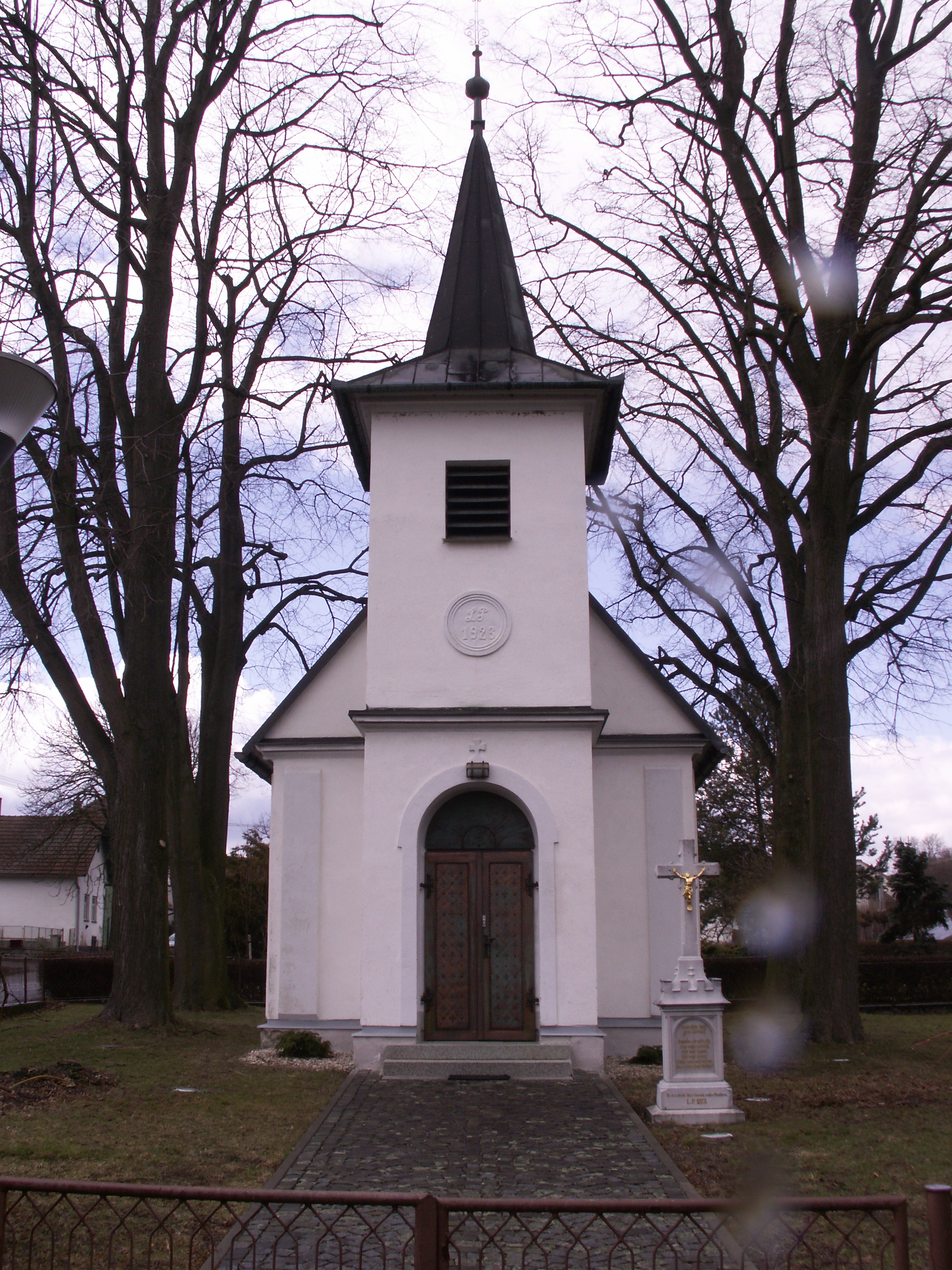 kaple sv. Prokopa, Pikárec, okres Žďár nad Sázavou